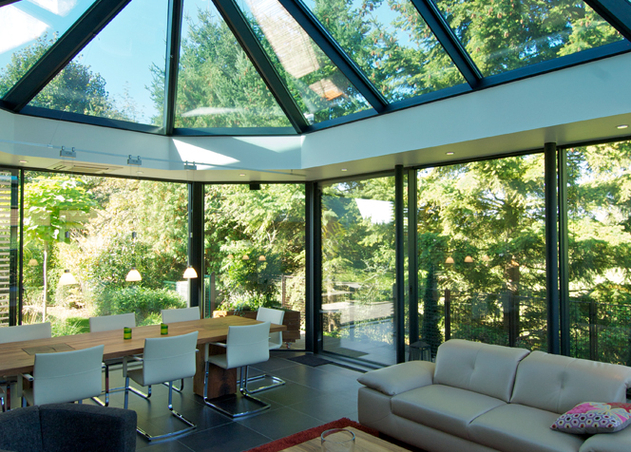 Wintergarten mit dem minimal-windows - System der Keller AG